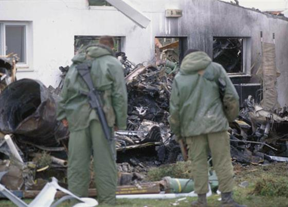 חיילים ליד שברי המסוק